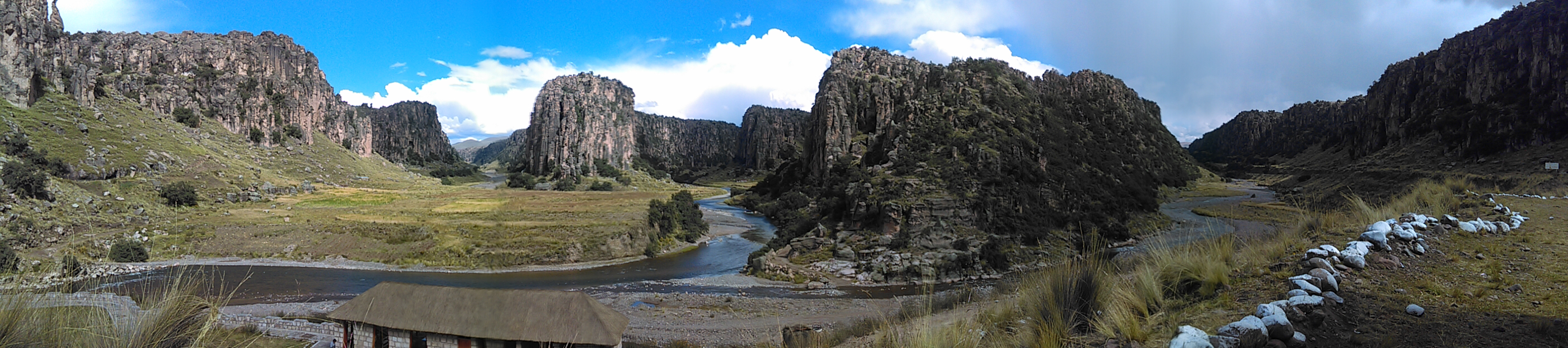 Este majestuoso lugar conocido como Tres Cañones o Cañón de Suykutambo, por estar ubicado en el distrito que lleva el mismo nombre provincia de Espinar y departamento de Cusco, se compone de montañas en cuyas cimas se levantan monumentales formaciones rocosas de origen volcánico que dan el aspecto de interminables y misteriosos bosques de piedras. Estos gigantes de piedra, los Tres Cañones, es el punto donde confluyen los ríos Apurímac, Callumani y Cerritambo para formar el Gran Apurímac.